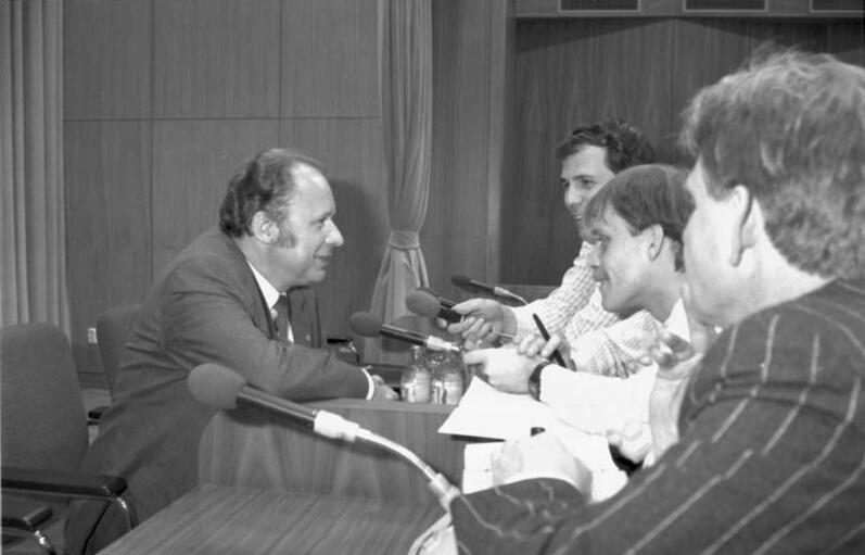 Berlin, Rücktritt des Ministerrates ADN-ZB/Roeske/7.11.89/Berlin: Regierungsrücktritt/ Regierungssprecher Wolfgang Meyer gab vor der internationalen Presse bekannt, daß der Ministerrat der DDR zurückgetreten ist. Danach stellte er sich weiteren Fragen der Korrespondenten. Abgebildete Personen: Meyer, Wolfgang: Regierungssprecher, DDR